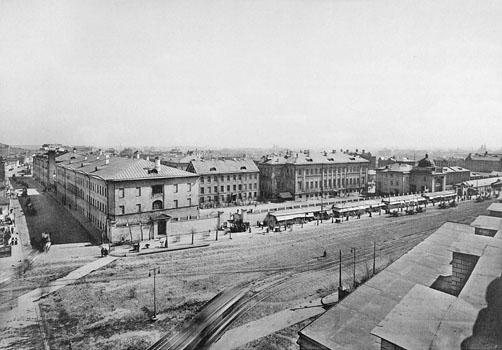 195. Спасскiя казармы на Садовой ул. (Москва)